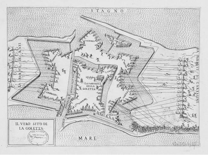 Carte du fort de la Goulette en 1500-1599, Tunisie